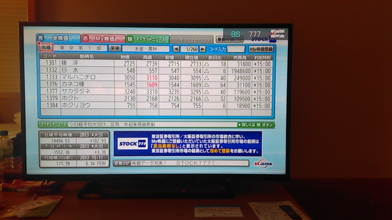 BSジャパン 株価データ放送「STOCK777」